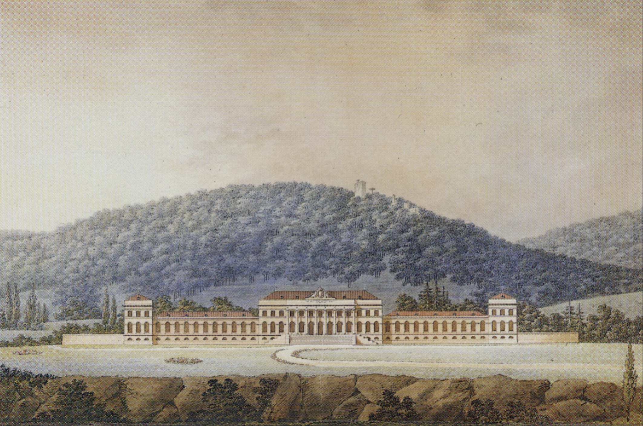 Baden bei Wien, Schloss Weilburg, Nordfront (um 1820)